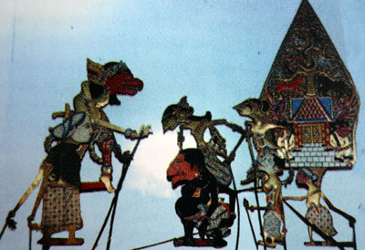 Wayang Klitik keren banget